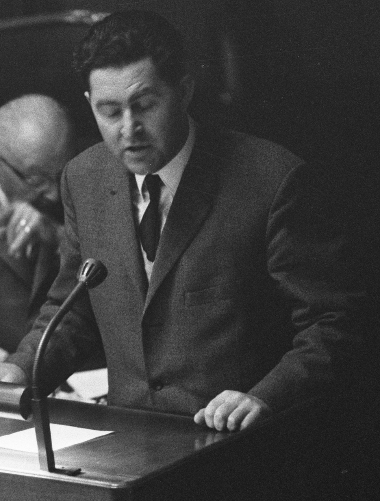 Collectie / Archief : Fotocollectie Anefo Reportage / Serie : Eerste Kamer behandeld een verklaring van de heer Hendrik Adams van de Boerenparij Beschrijving : dhr. Ymkers (CPN) voert het woord Datum : 4 oktober 1966 Locatie : Den Haag, Zuid-Holland Trefwoorden : kamerleden, politici Instellingsnaam : CPN Fotograaf : Fotograaf Onbekend / Anefo Auteursrechthebbende : Nationaal Archief Materiaalsoort : Negatief (zwart/wit) Nummer archiefinventaris : bekijk toegang 2.24.01.05 Bestanddeelnummer : 919-6424